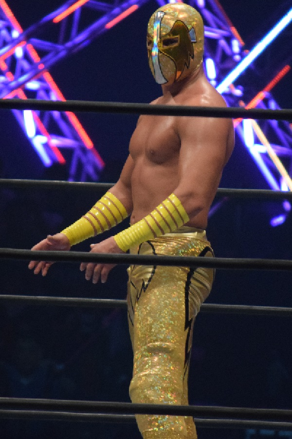 2016年11月5日 大阪府立体育会館「POWER STRUGGLE」 アンヘル・デ・オロ